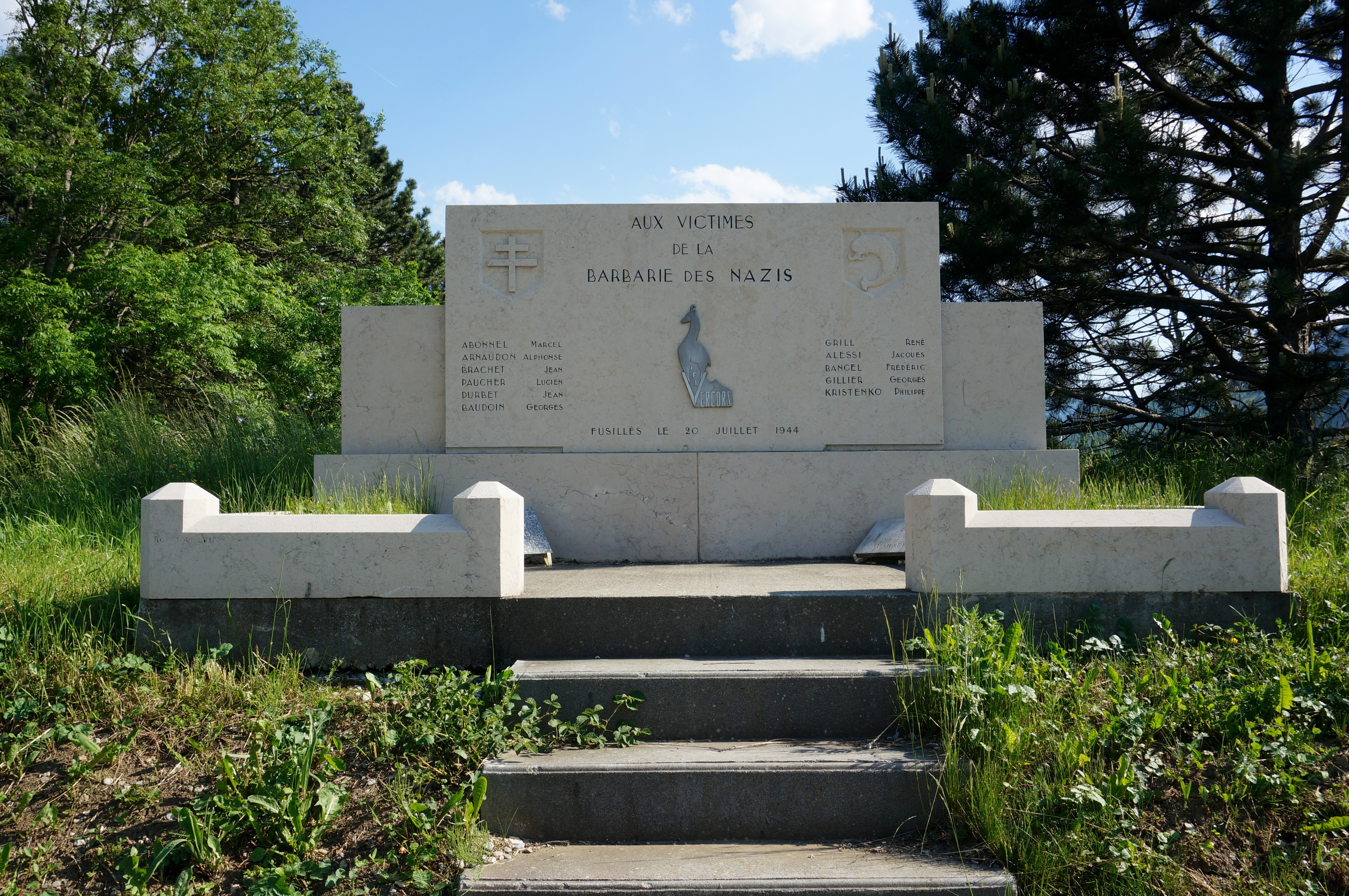 Monument commémoratif aux FFI du Vercors fusillés le 20 juillet 1944.